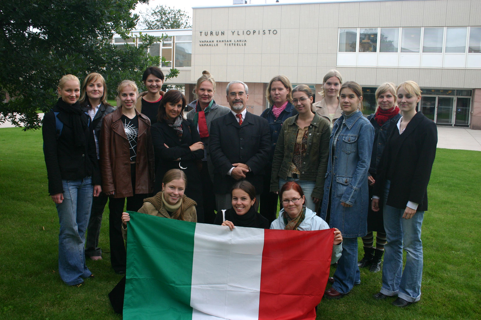 Studenti-Turun Ylipisto - Italian Kieli